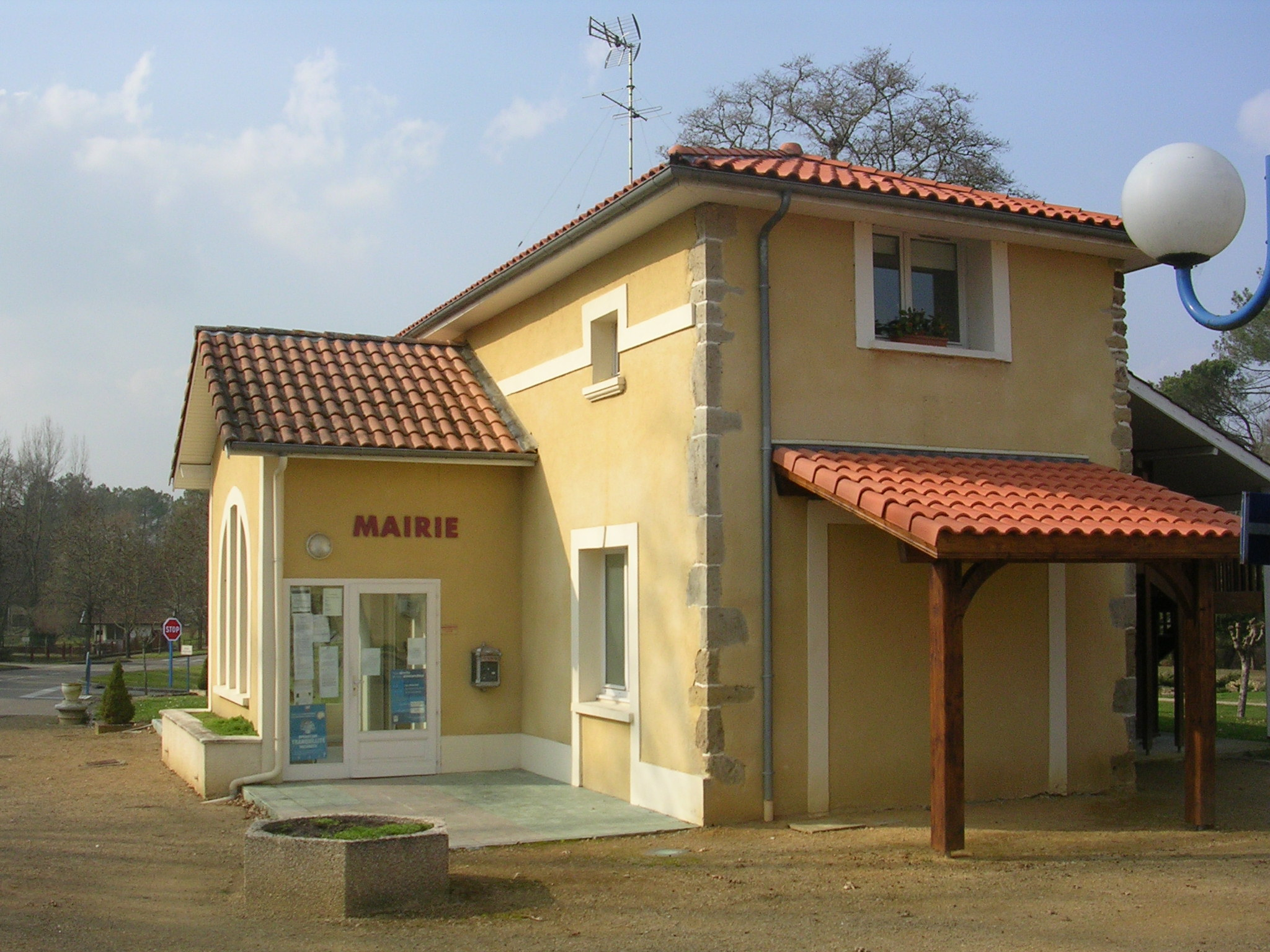 Mairie de Campet-et-Lamolère, dans le département français des Landes